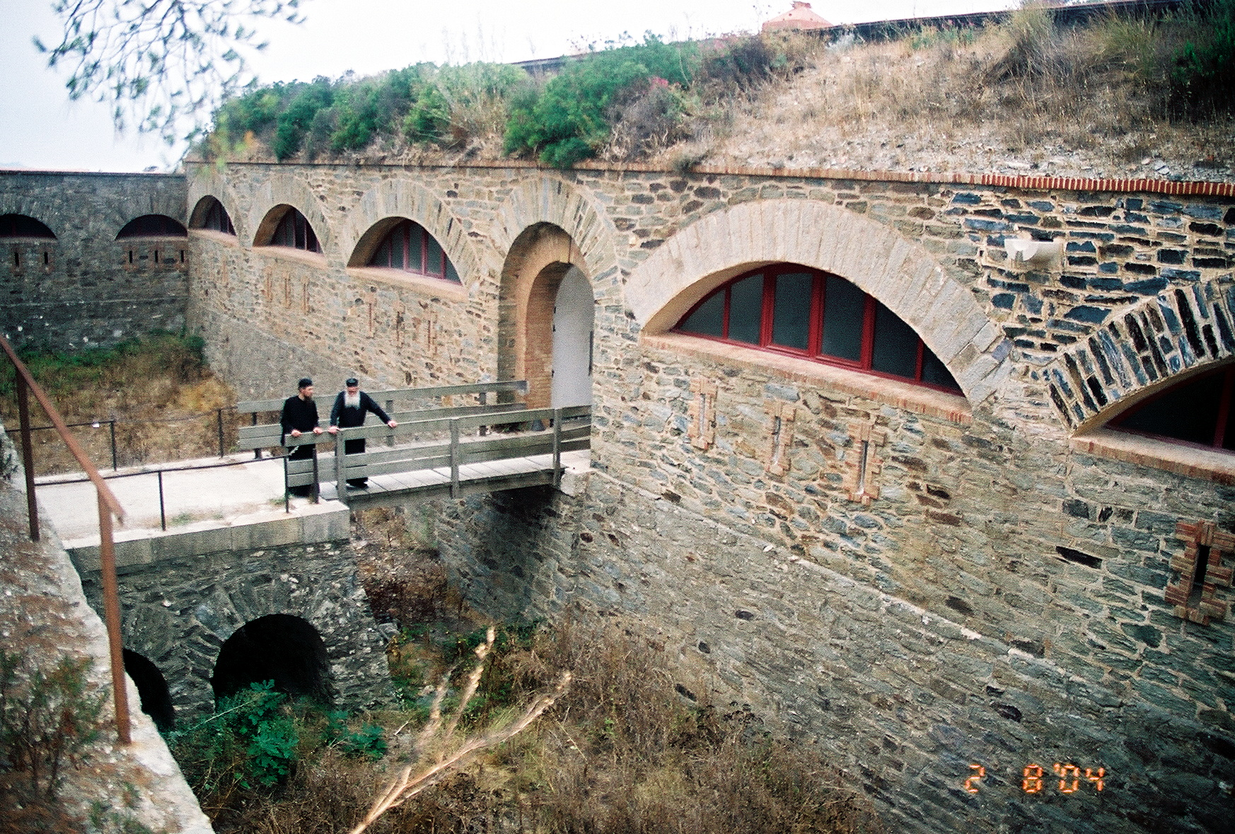 Монастырь святой Марии Египетской на острове Поркероль (Франция), подворье афонского монастыря Симонопетра.